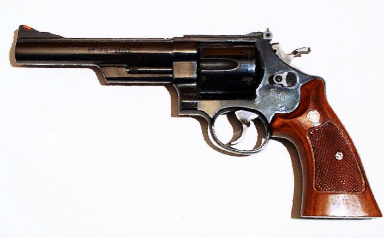 S&W Modell 29, erste Generation, 6"-Lauf